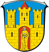 Wappen von Mengerskirchen